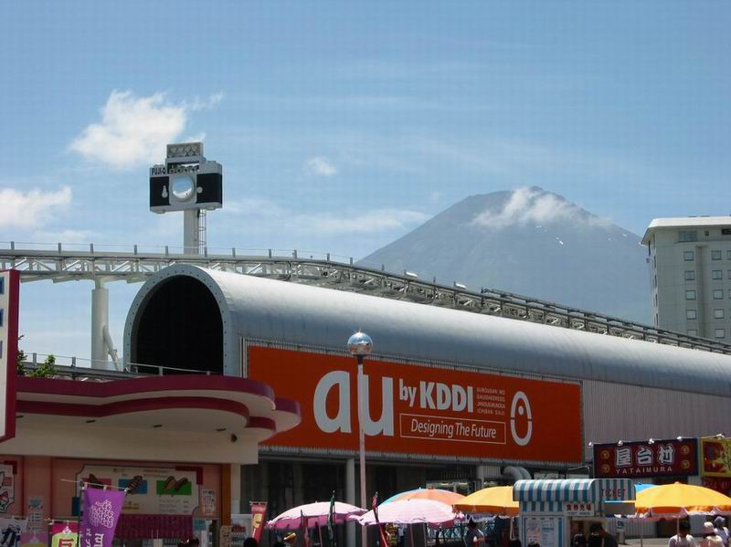 Mount Fuji seen from Fujikyu Highlands park